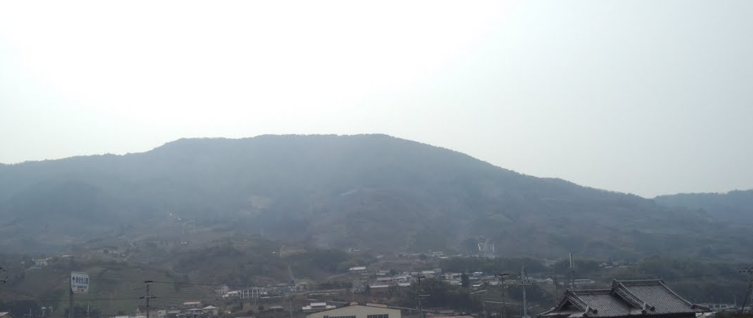 紀の川左岸より見た龍門山。